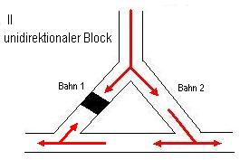 Fortsetzung unidirektionaler Block einer kreisenden Erregung am Herzen. Vorlage aus EKG-Kurs für Isabel Hans-Peter Schuster/Hans-Joachim Trappe